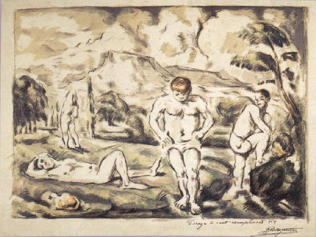 Banhistas, desenhos de Paul Cézanne no Museu de Belas Artes de Caracas, Venezuela.